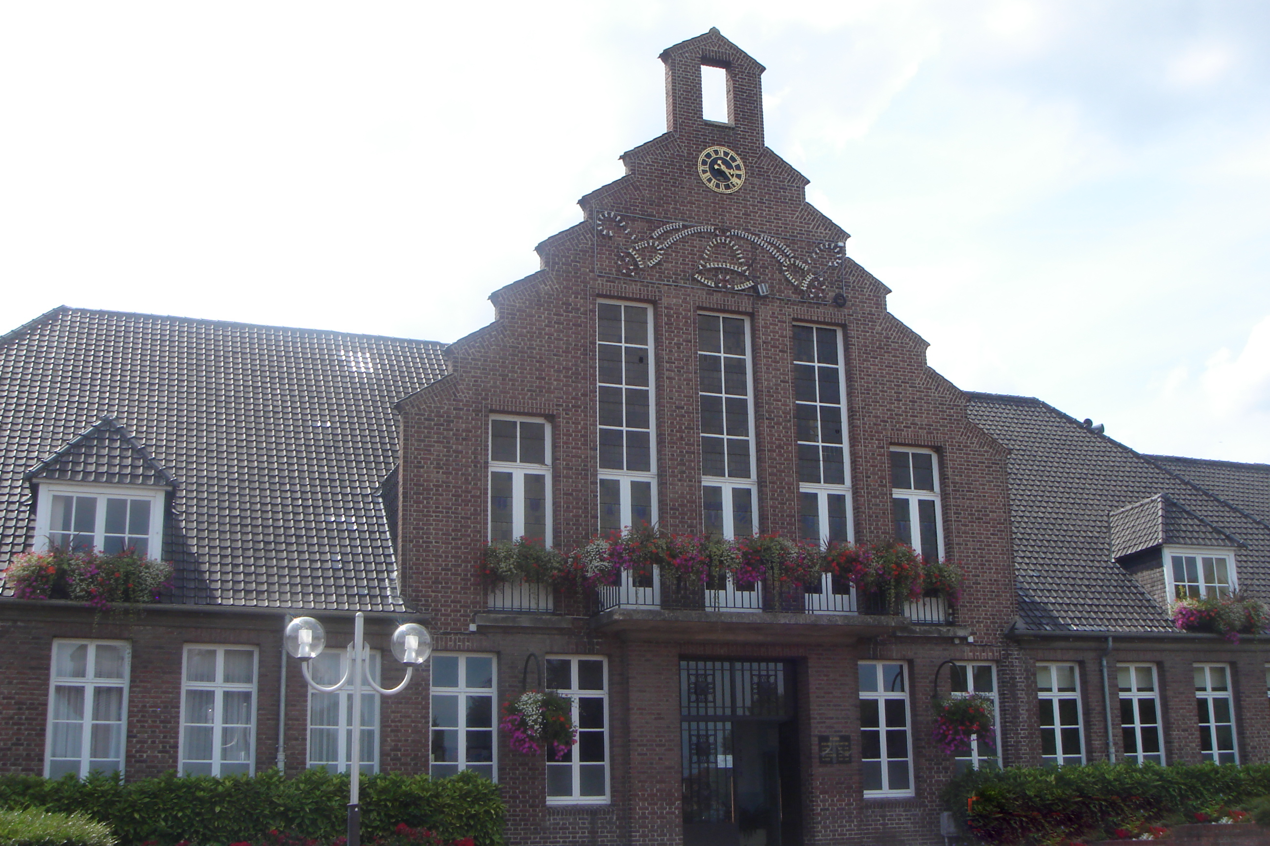 Mairie de Roeulx - département du Nord - France